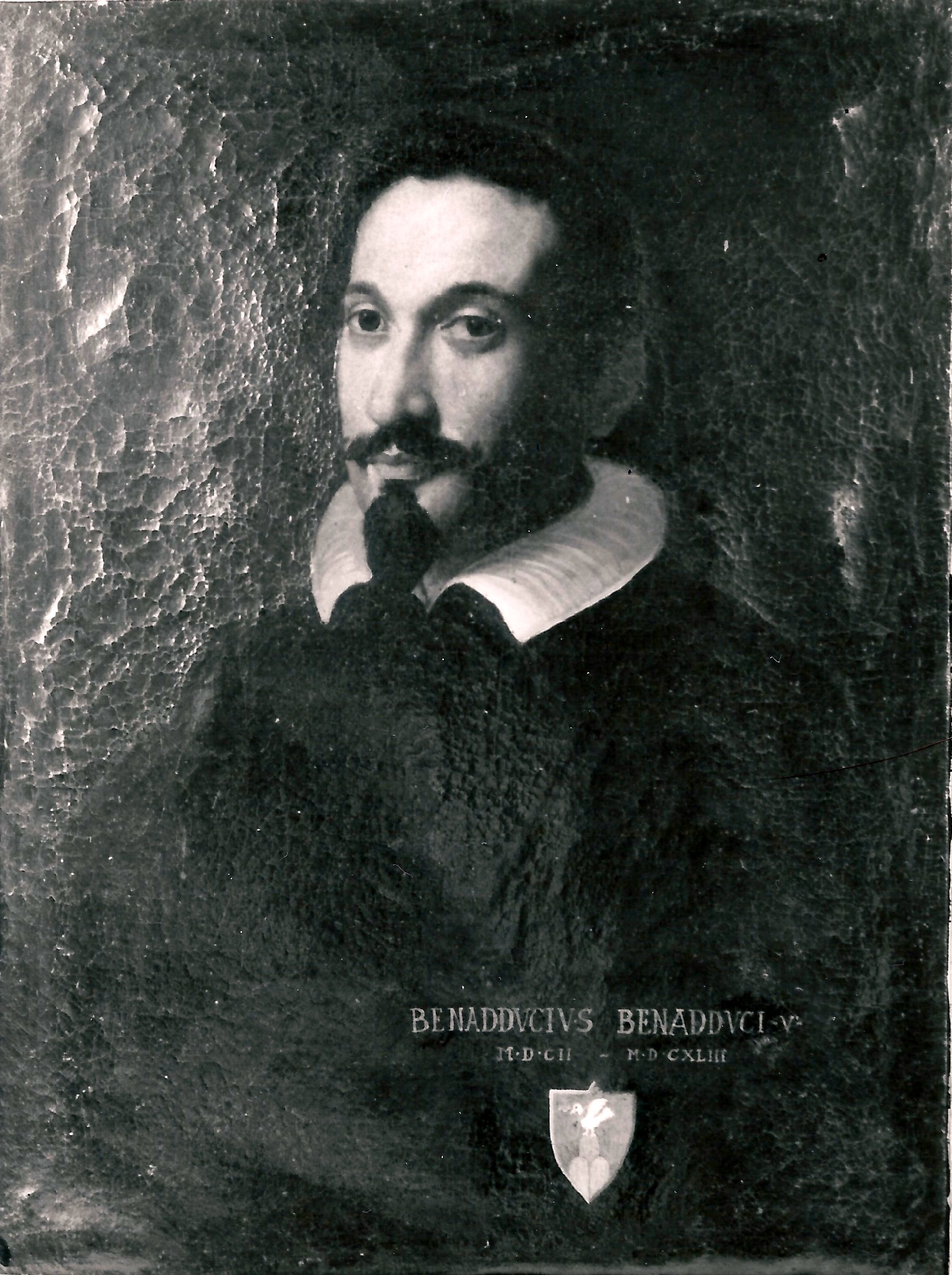 Scuola bolognese, XVII sec.